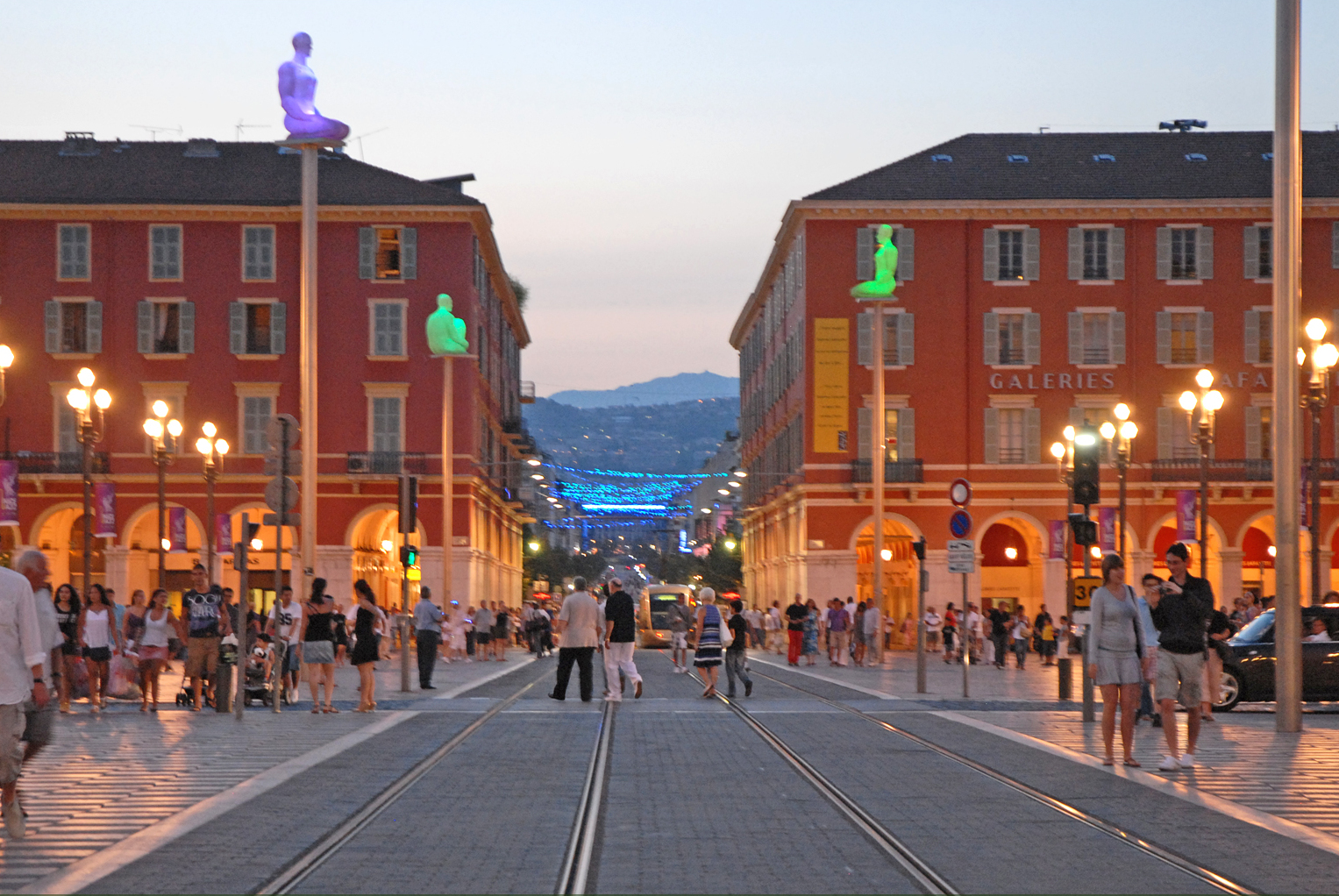 La place Masséna et l'axe de l'avenue Jean Médecin au crépuscule La mise en service en 2007 du tramway à Nice a profondément transformé le centre ville et notamment la place Masséna et l'avenue Jean Médecin où seules peuvent circuler les rames du tramway. Des oeuvres d'art ont été commandées à des artistes contemporains pour agrémenter différentes stations du tramway. Sur la place, sept statues de personnages illuminés représentant les sept continents composent l'oeuvre «Conversation à Nice» de Jaume Plensa (oeuvre en partie sur la photo) Au fond, dans l'avenue Jean Médecin, l'oeuvre : « L'amorse du bleu » : nuage de lumière. de l'artiste : Yann KERSALE voir aussi l'oeuvre de JM Othoniel à la station Valrose Pour la première fois, en 2011, le festival de jazz de Nice s'est déroulé en centre ville dans le jardin Albert 1er et non plus à Cimiez. La billetterie se trouvait Place Masséna ce qui a contribué au succès de cette initiative. Article de Wikipedia sur la place Masséna